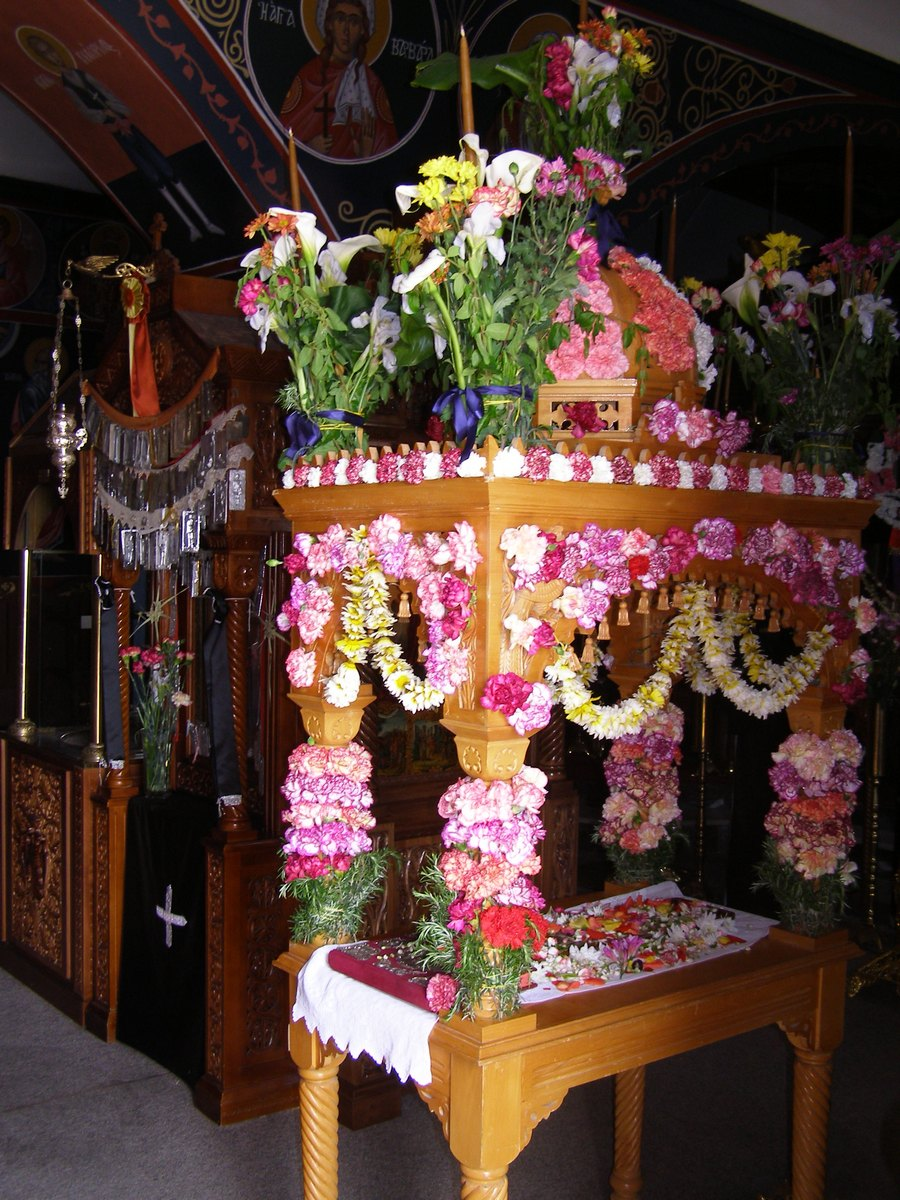 Eine geschmückte Lade, die in orthodoxen Kirchen am Karfreitag in einer Prozession durch den Ort getragen wird